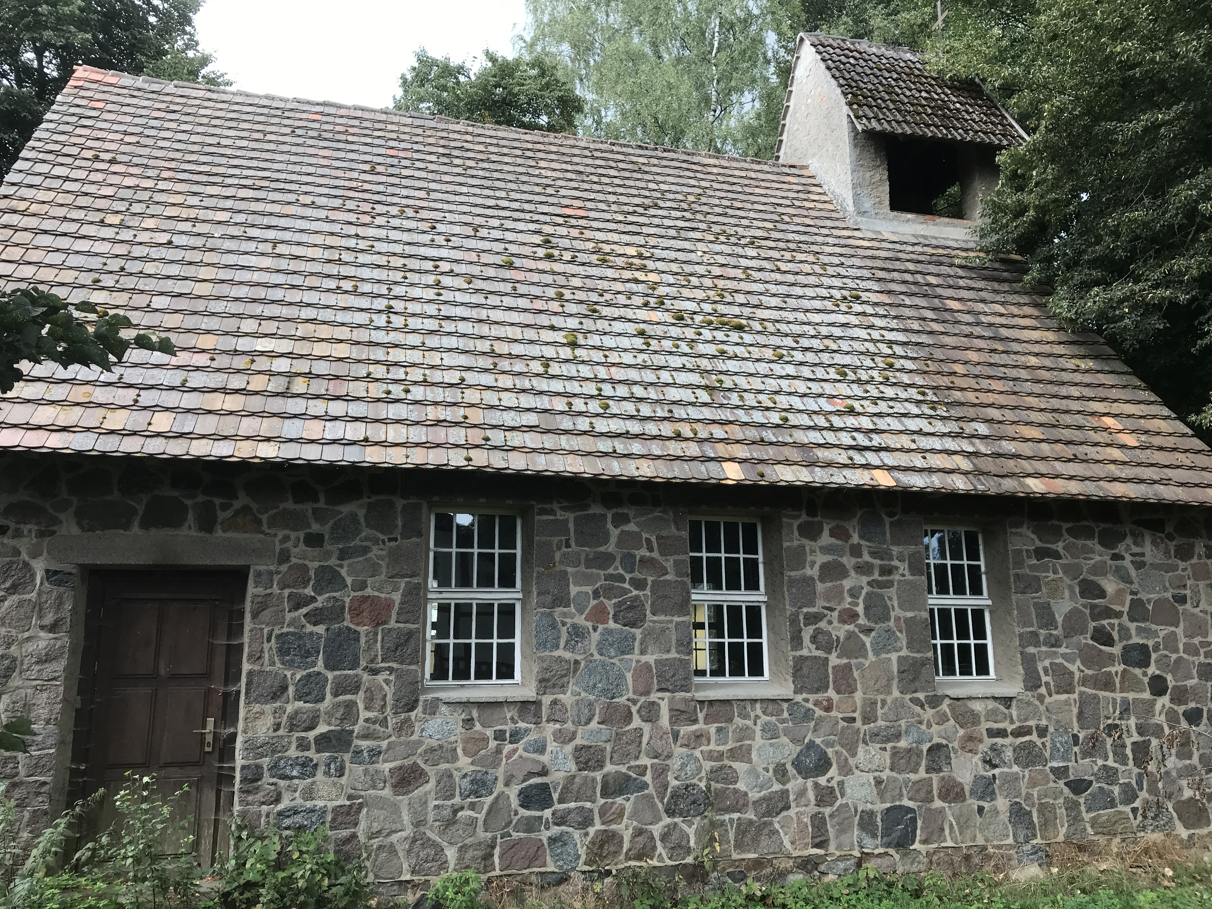 Die Kapelle Gremersdorf entstand im Jahr 1954 aus behauenen Feldsteinen. Die Kirchenausstattung ist schlicht.